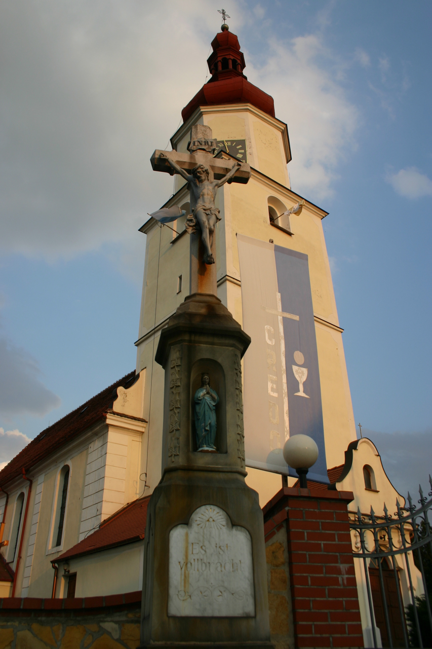 Strzeleczki Klein Strehlitz Object location50° 27′ 33″ N, 17° 51′ 09″ E